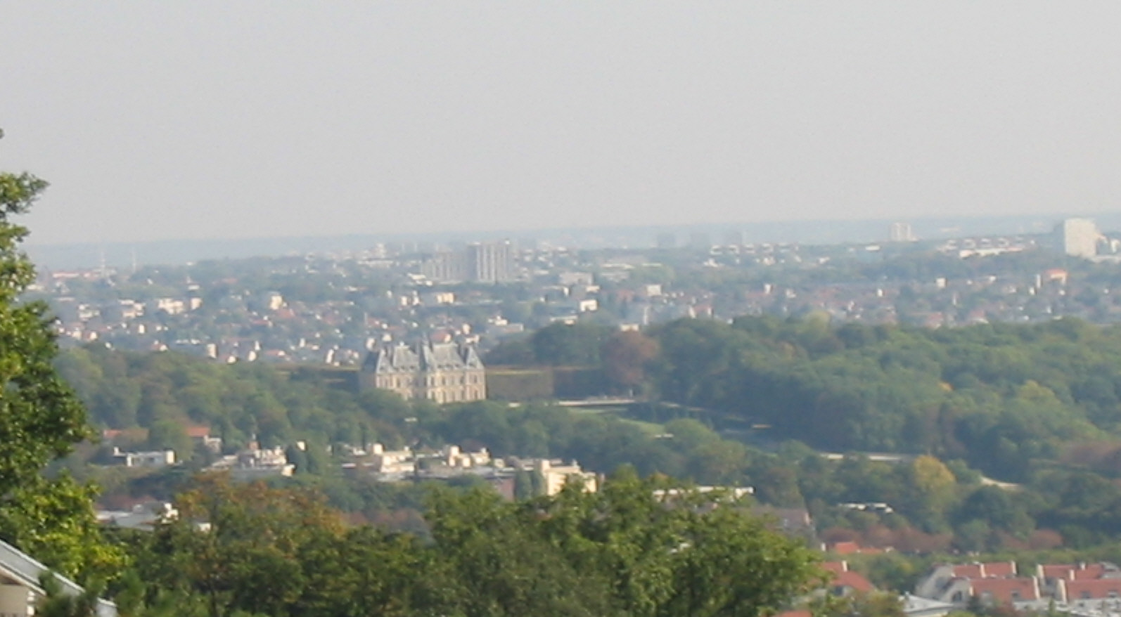 Communauté d'agglomération des hauts-de-Bièvre : aperçu de Sceaux depuis les hauteurs de Robinson. Je suis l'auteur du cliché pris à l'automne 2005.